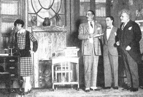 Escena de la obra de teatro Atrévete Susana, de Ladislas Fodor